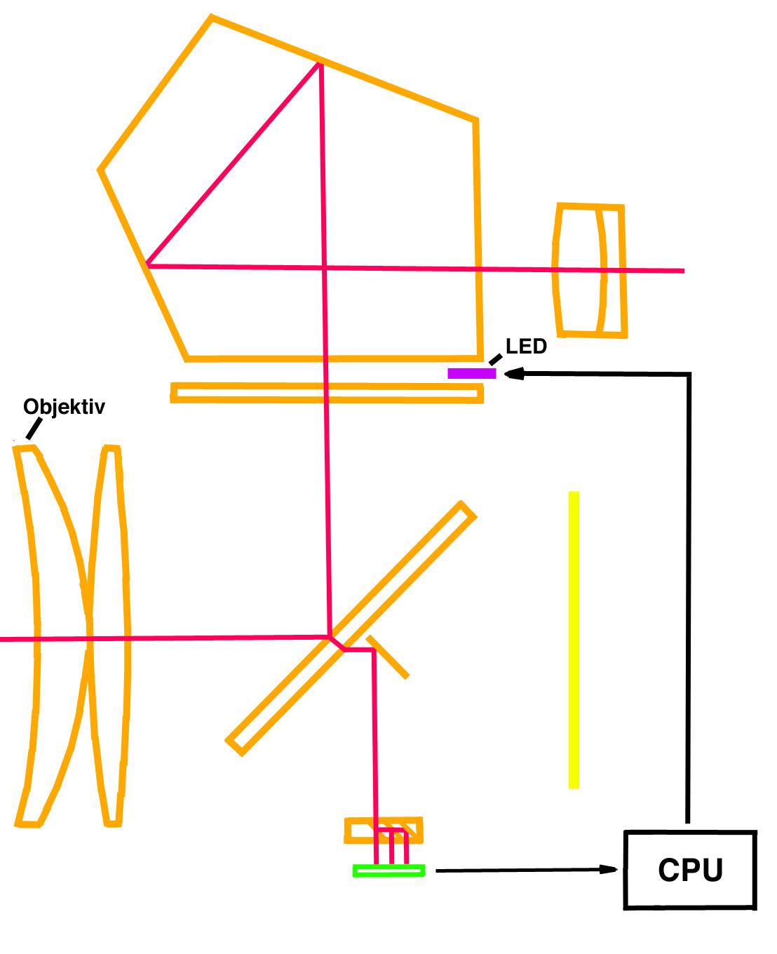 Canon AL-1 Funktionsweise des Quick Focus Systems